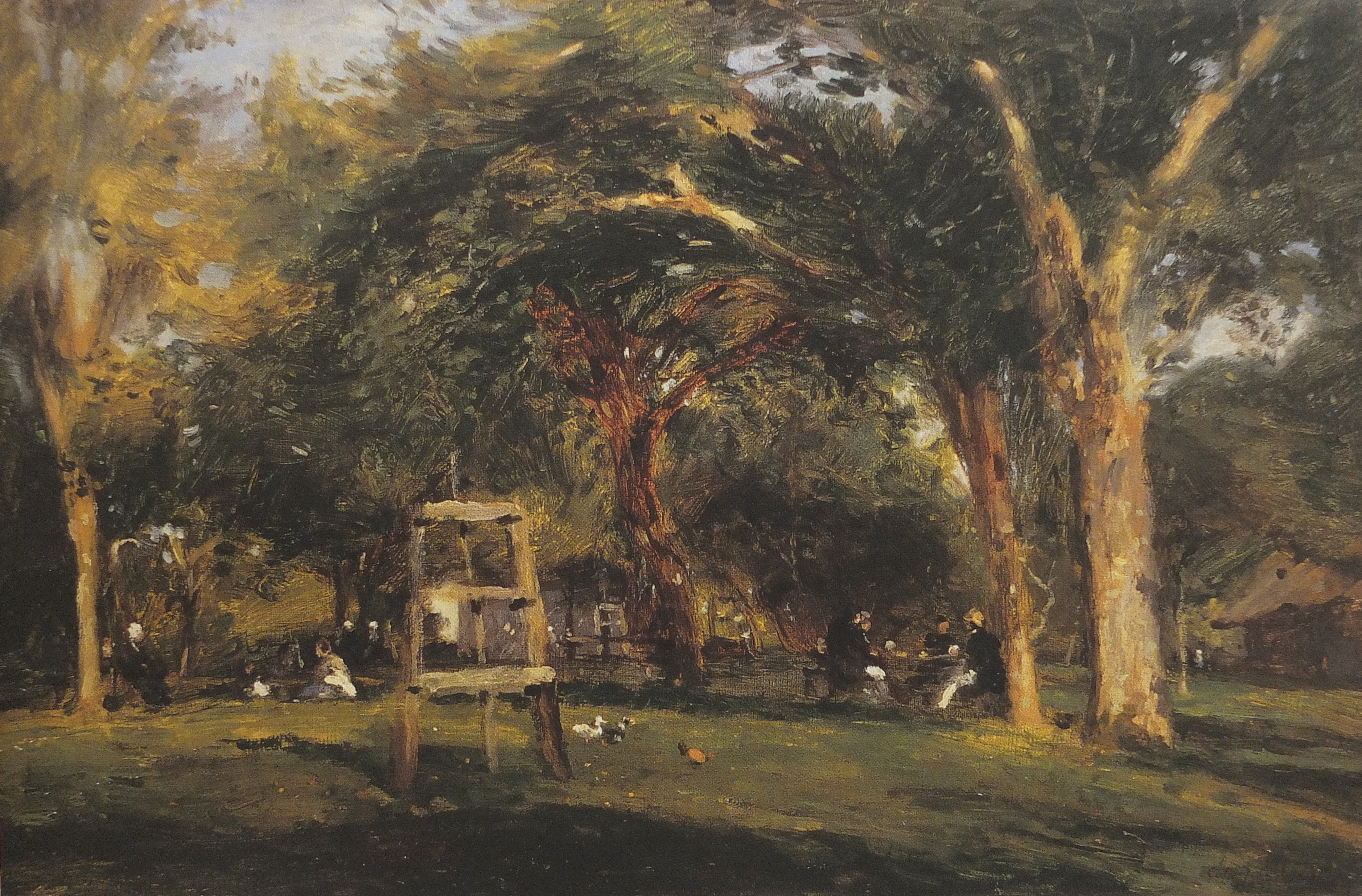 Saint-Siméon ou La Grande Ferme à Honfleur, huile sur toile d'Adolphe-Félix Cals (1810-1880), signée et datée en bas à droite, 35x54 cm - Musée des Beaux-Arts de Caen, n° PN 994.6.1.